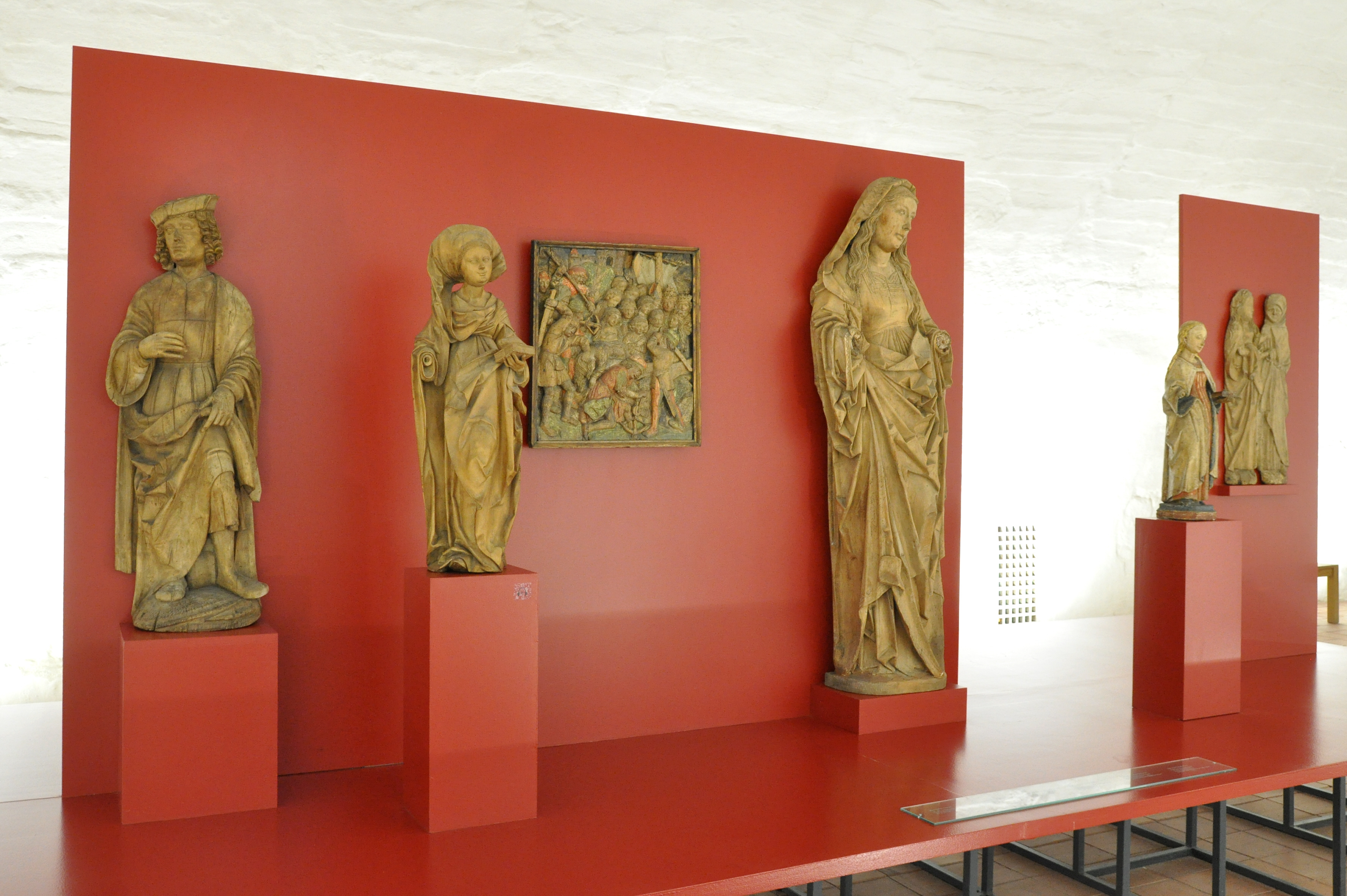 Hl. Elisabeth von Thyringen, Skulptur aus Holz, unmekannter Meister um 1500 im Kontext der Nachbarfiguren in der "Mittleren Tonne" des Refektoriums